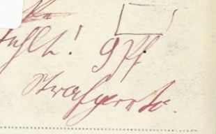 Oelsnitz: Eine Fotoansichtskarte aus dem nicht weit entfernt liegenden Lengenfeld mit einer Szene aus dem Schwimmbad erreicht den Empfänger ohne Briefmarke. Briefmarke fehlt. Nachgebühr 9 Pf. Das Wort Briefmarke ist durch ein gezeichnetes Rechteck ersetzt an der Stelle, wo die Briefmarke hätte kleben sollen. Der Text im Wortlaut: „ … fehlt. 9 Pfg. Strafporto.“ Ca. 1930er Jahre oder früher. Waren das noch Zeiten, als die Post noch Strafporto verhängen konnte.